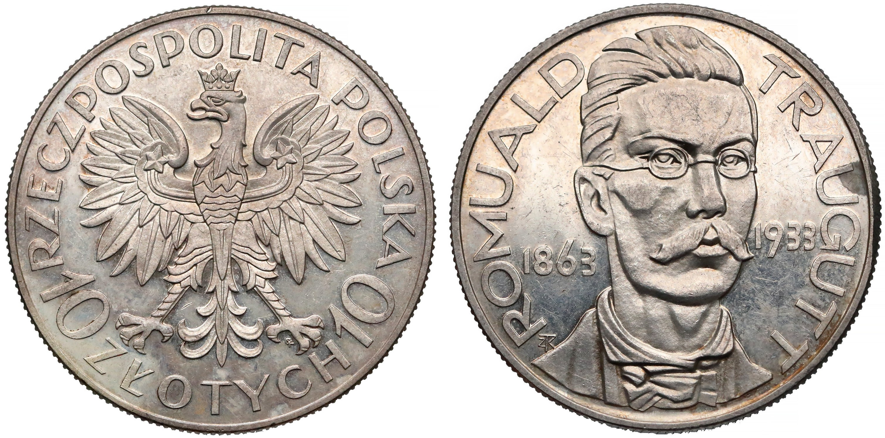 PRÓBA 10 złotych 1933 Romuald Traugutt stempel lustrzany